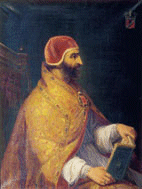 Papa Innocenzo VI.